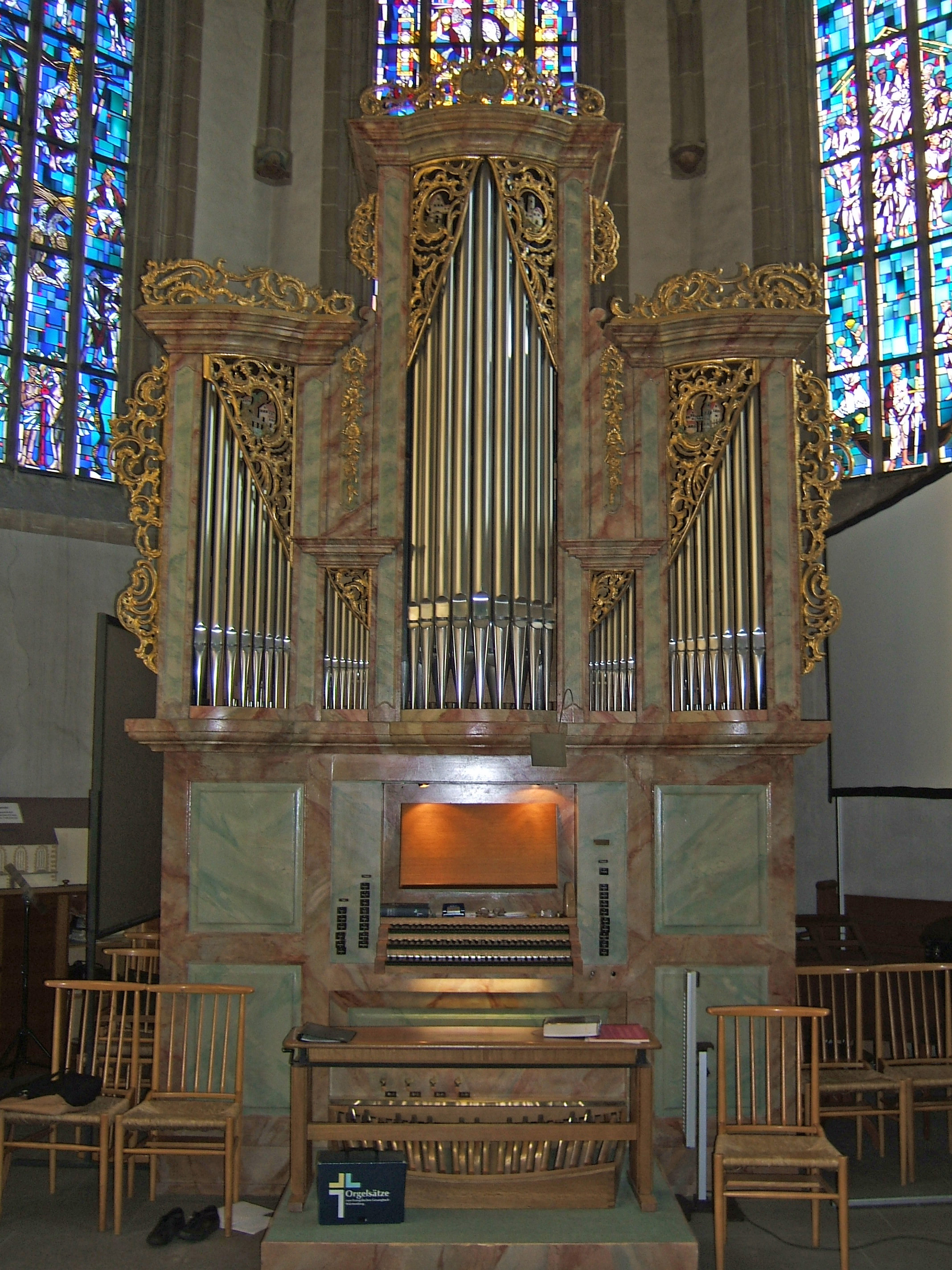 St.-Veit-Kirche Gärtringen, Orgel